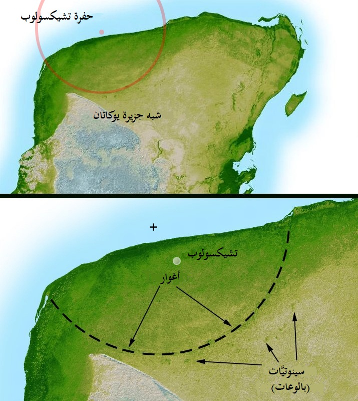 رسمٌ مُظلل لِشبه جزيرة يوكاتان بالمكسيك يُظهرُ الانخفاض البسيط، لكن الواضح للعيان، بِسبب الاصطدام الكُويكبي في منطقة تشيكسولوب. يتَّفقُ مُعظم العُلماء اليوم أنَّ هذا الاصطدام الكُويكبي كان السبب الرئيسي وراء حدث انقراض العصر الطباشيري - الثُلاثي، وهو الحدث الذي وقع مُنذ 65 مليون سنة وتسبب في انقراض الديناصورات وأغلب أشكال الحياة على الكُرة الأرضيَّة.